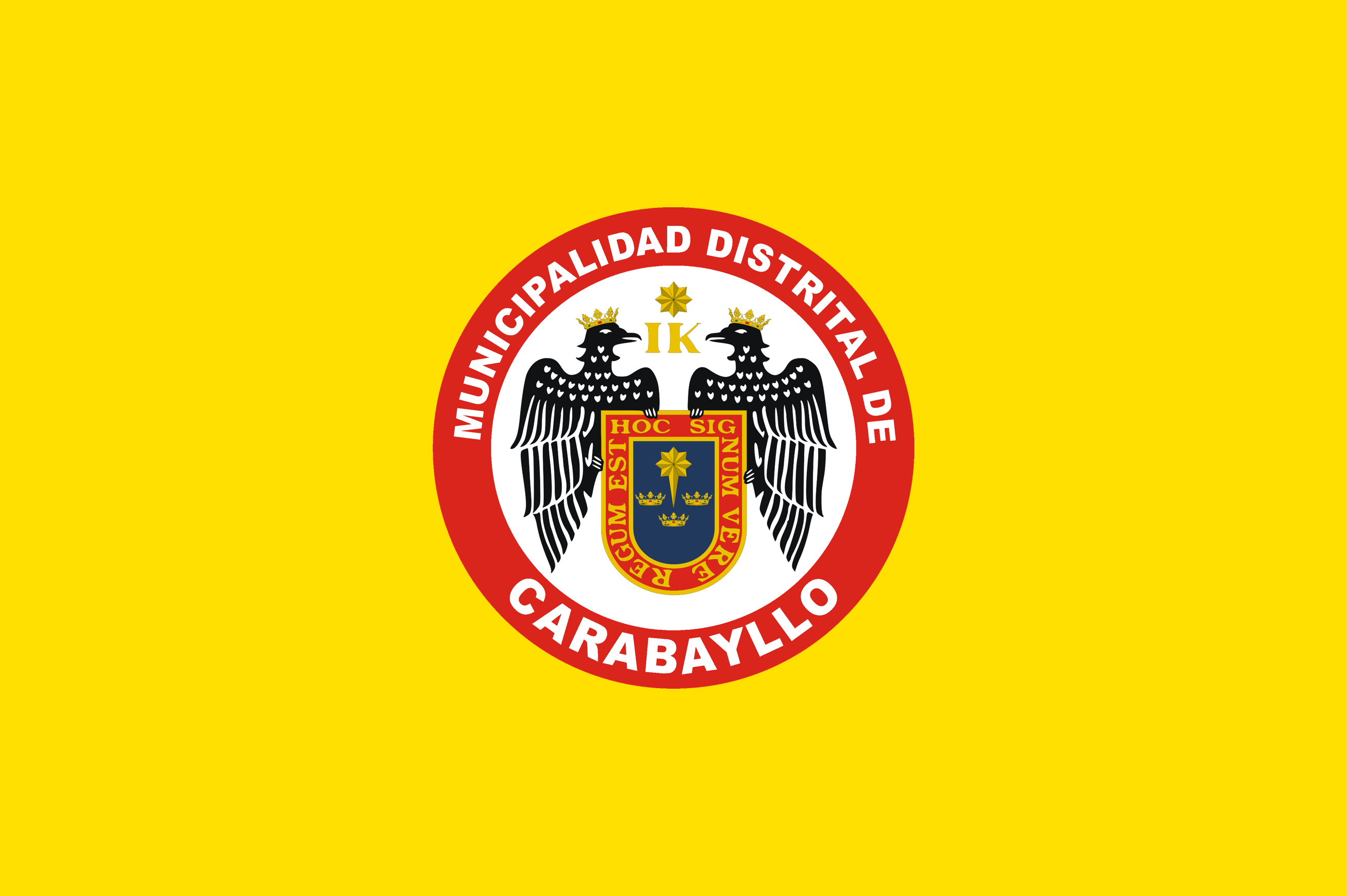 Bandera Municipal de Carabayllo, en Lima Norte